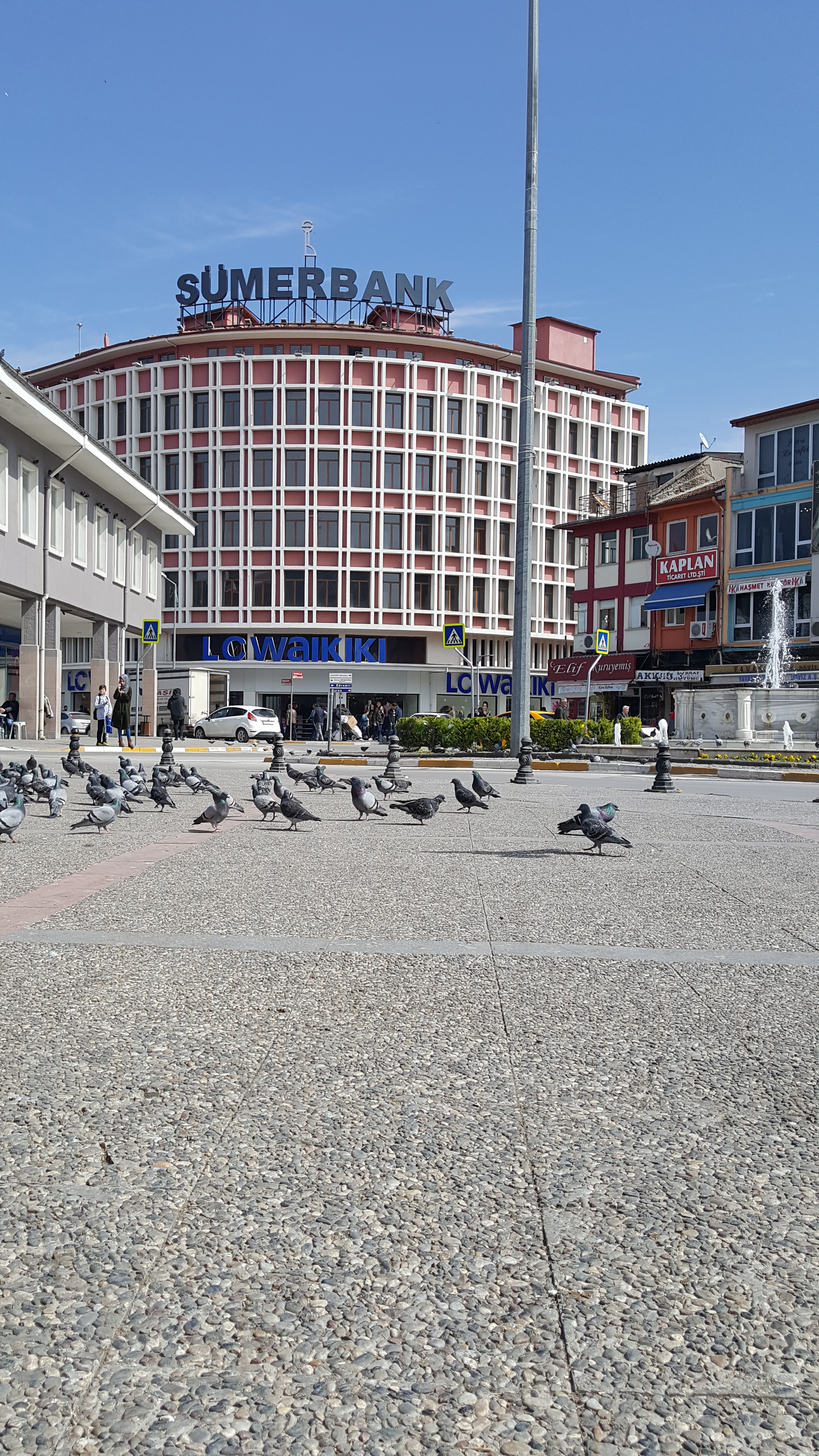 Sümerbank, Balıkesir, 2018